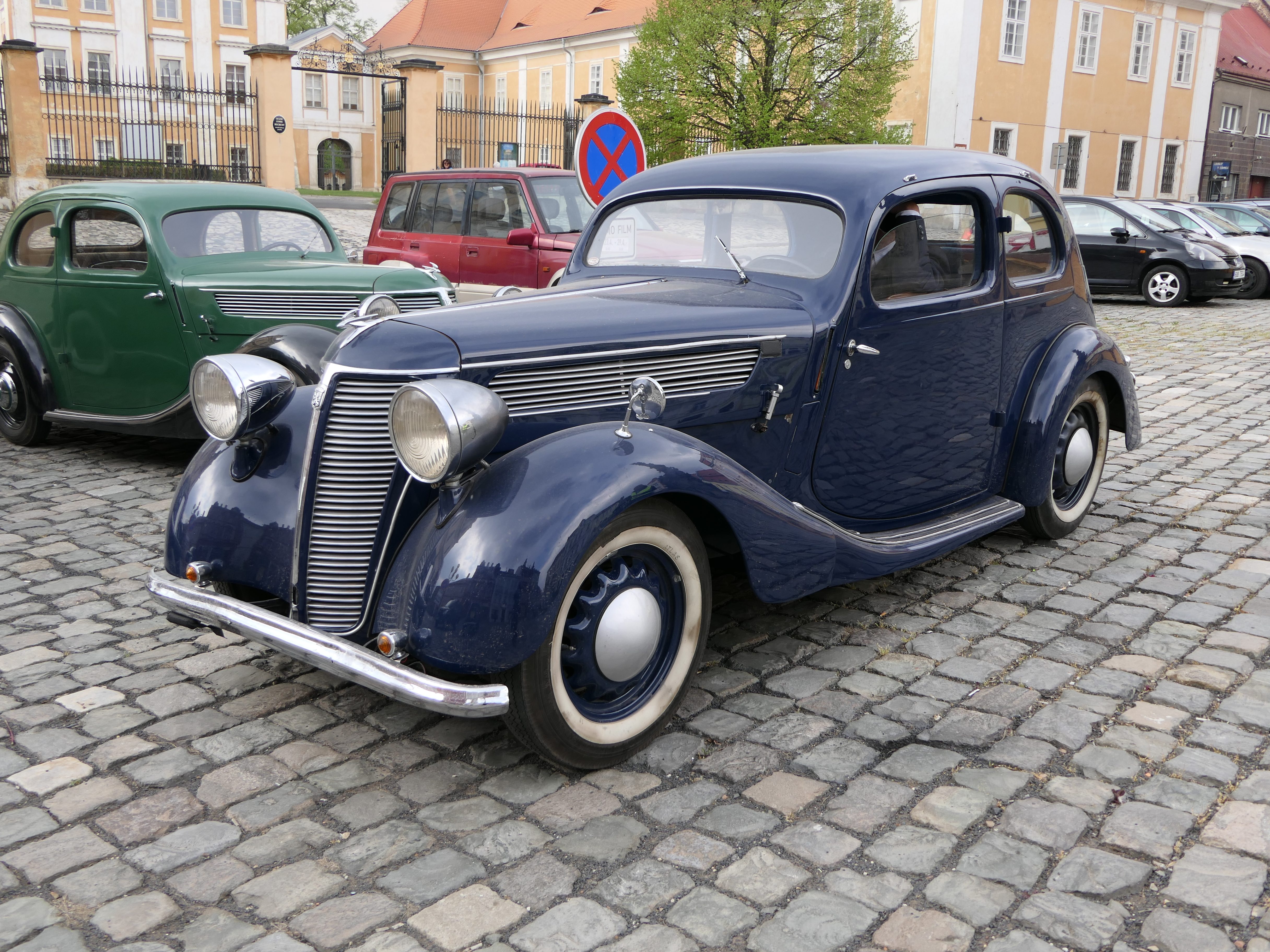 Czech Automobile Praga Piccolo 1939